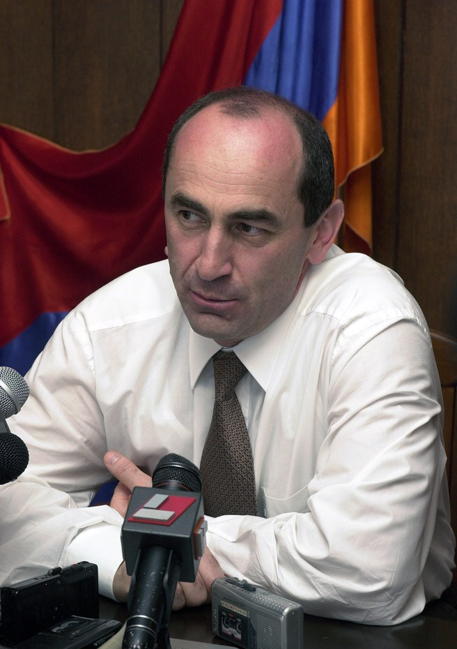 Интервью Роберта Кочаряна, 2003г.